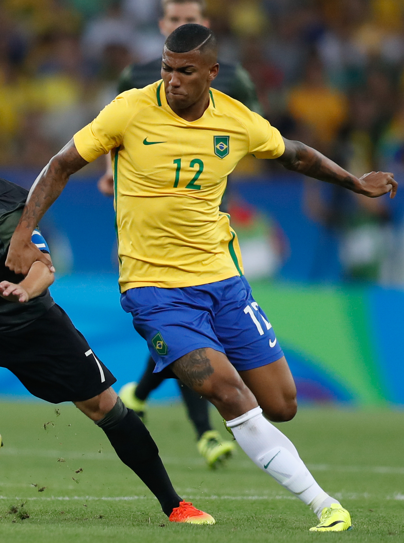 Rio de Janeiro - Brasil e Alemanha disputam a medalha de ouro no futebol masculino